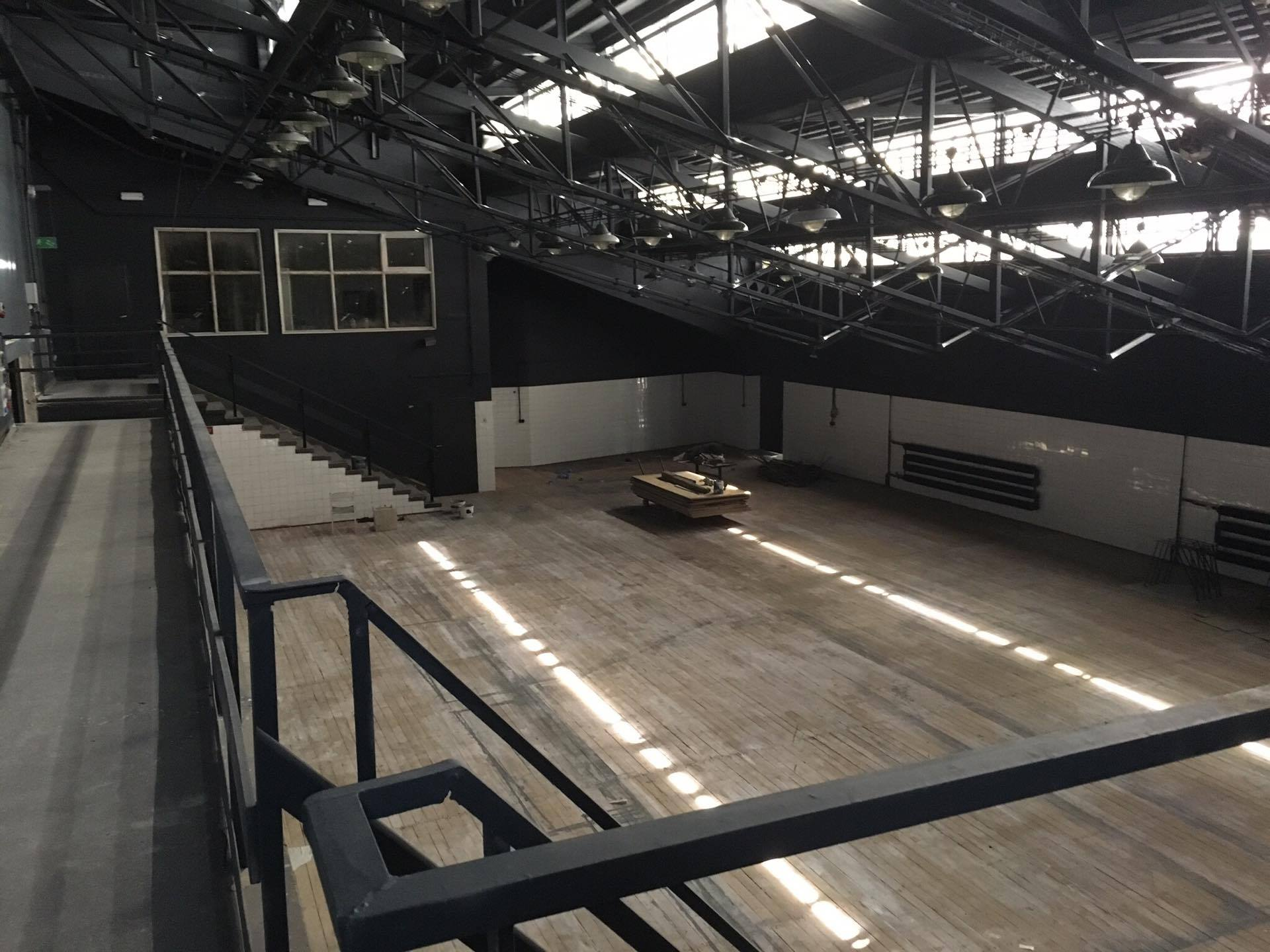 Scena - Modelatornia